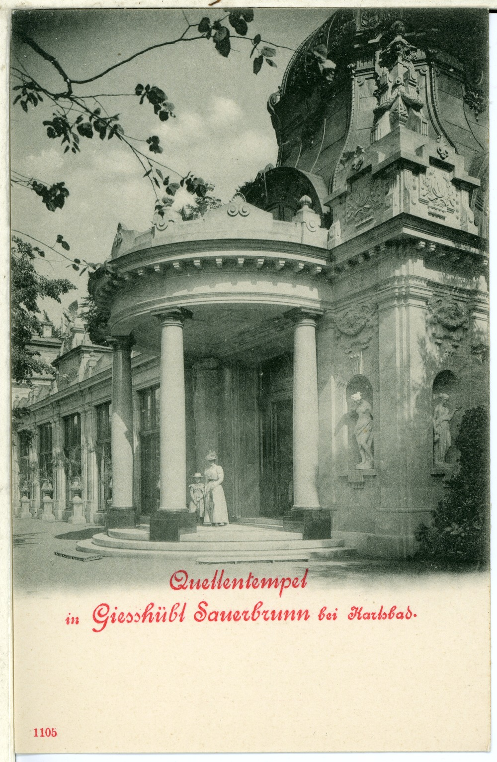 Gieshübel; Sauerbrunn - Quellentempel This postcard is from publisher Brück & Sohn in Meißen ( postcard has a unique number 01105 and is available in a higher resolution at the publisher. This images was uploaded in a cooperation project between Wikipedians and the publisher.